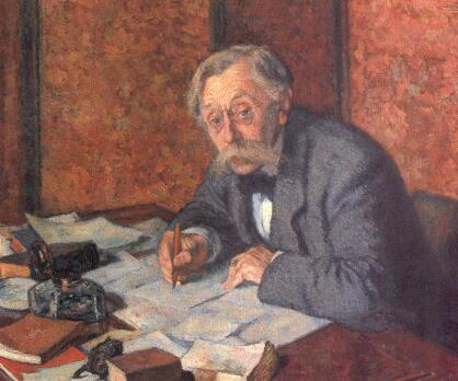 Émile Verhaeren (1855-1916), Belgian poet